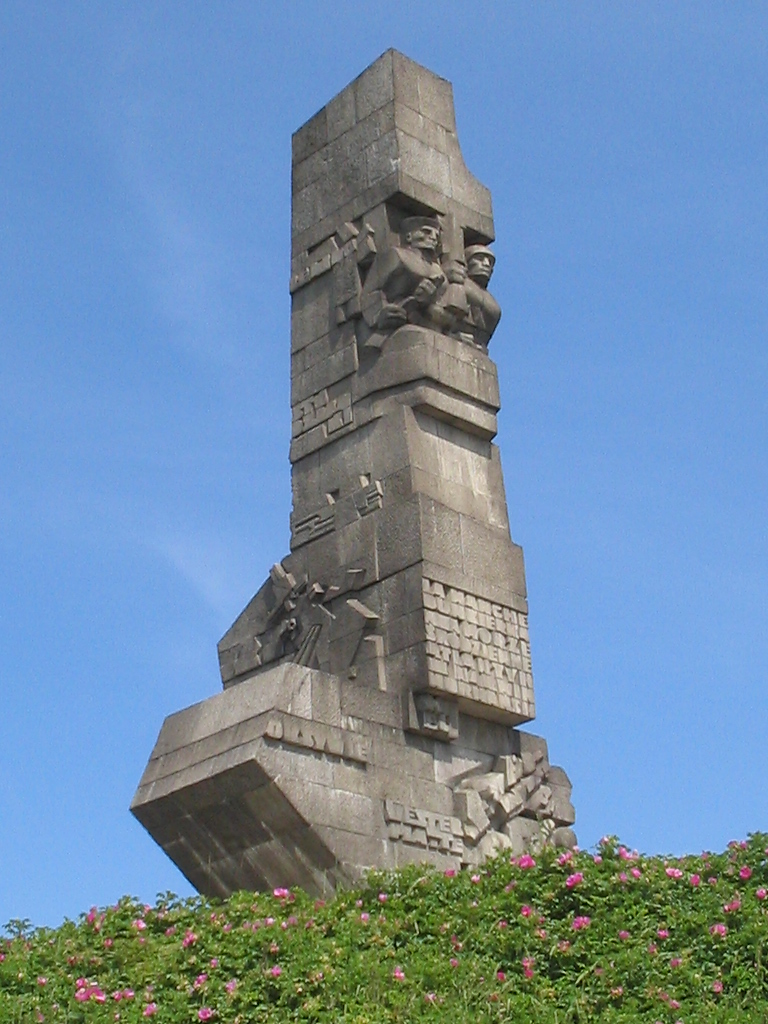 Monument Westerplatte, Gdansk, Poland